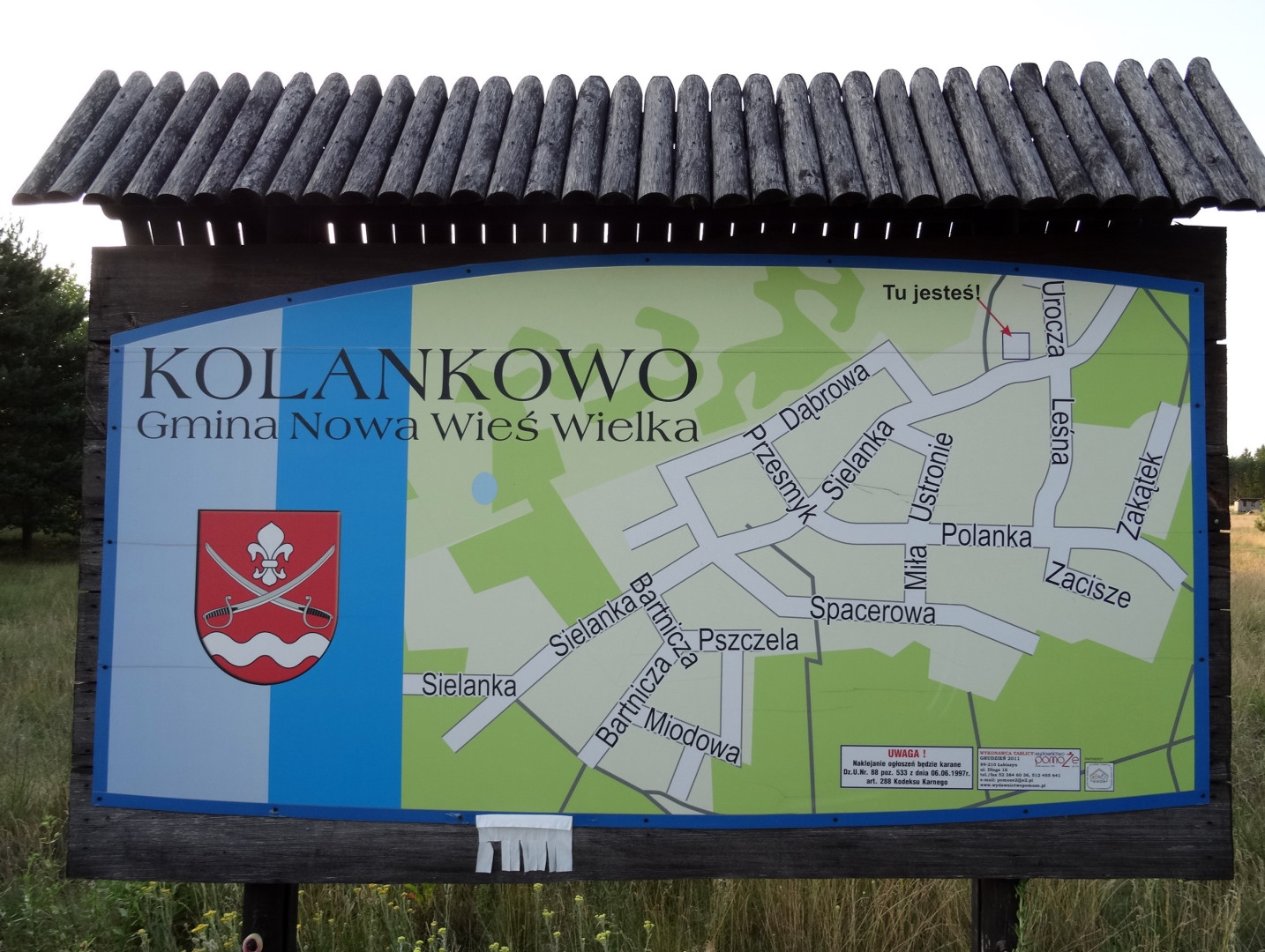 Kolankowo, gmina Nowa Wieś Wielka, powiat bydgoski